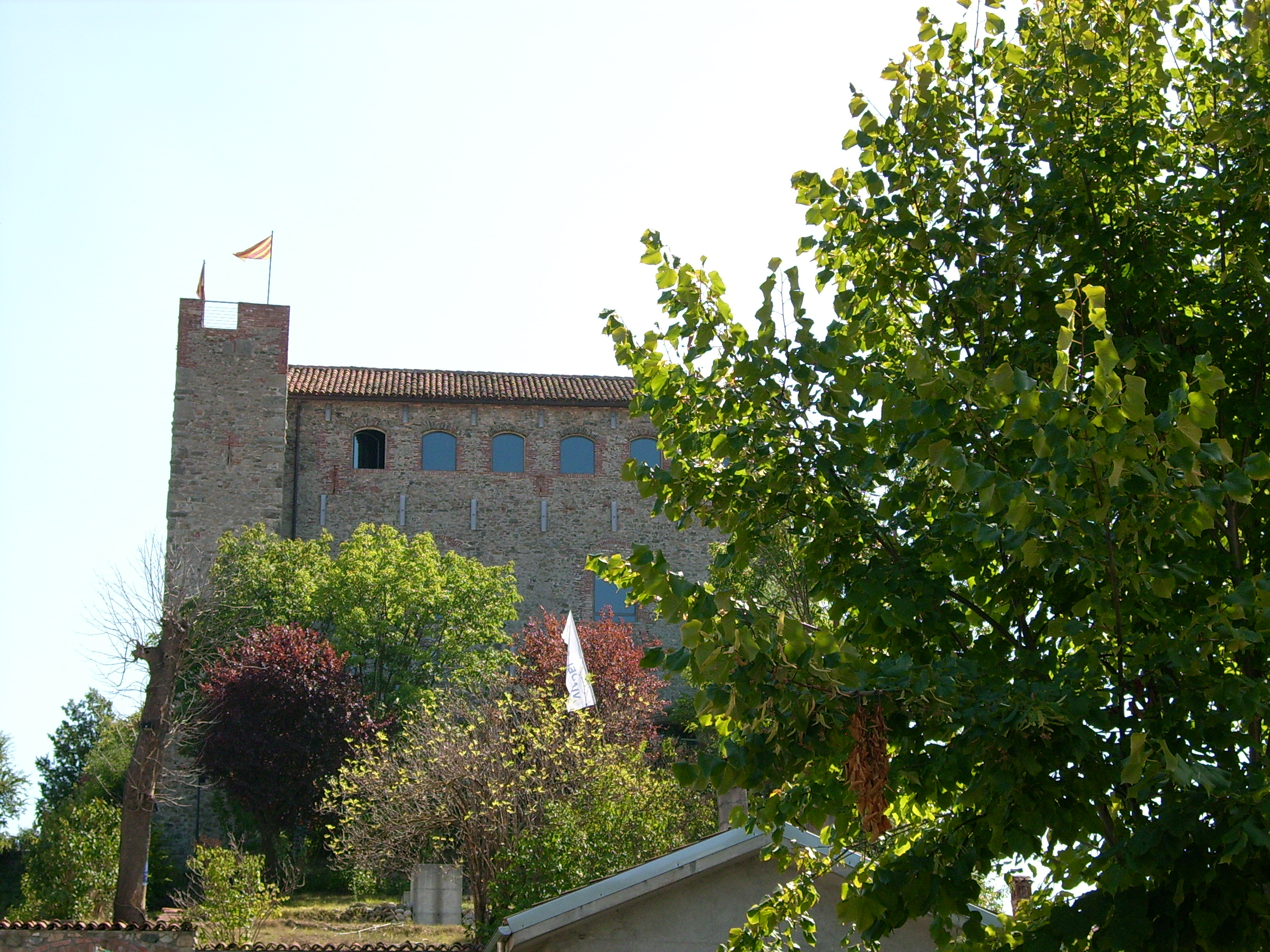 Castello di Millesimo, Liguria, Italia